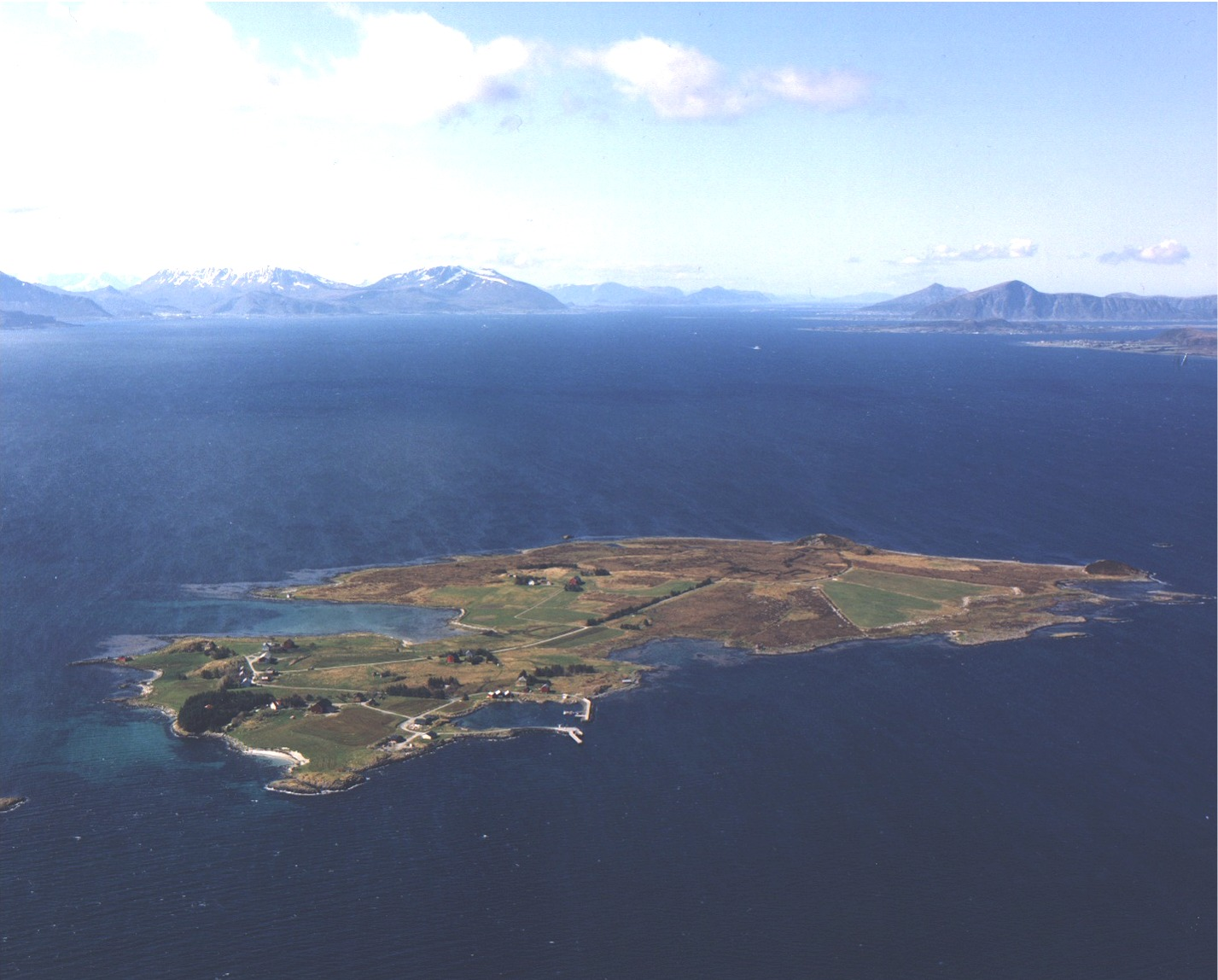 Flyfoto av Orten